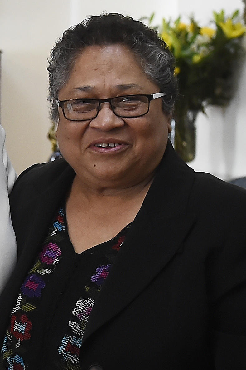 Gobierno de Chile